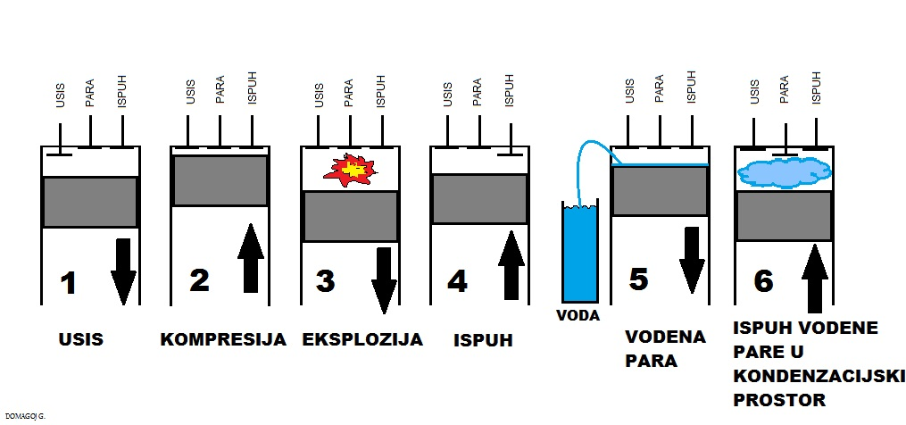 ŠESTEROTAKTNI MOTOR SA VODENOM PAROM KAO MEDIJEM